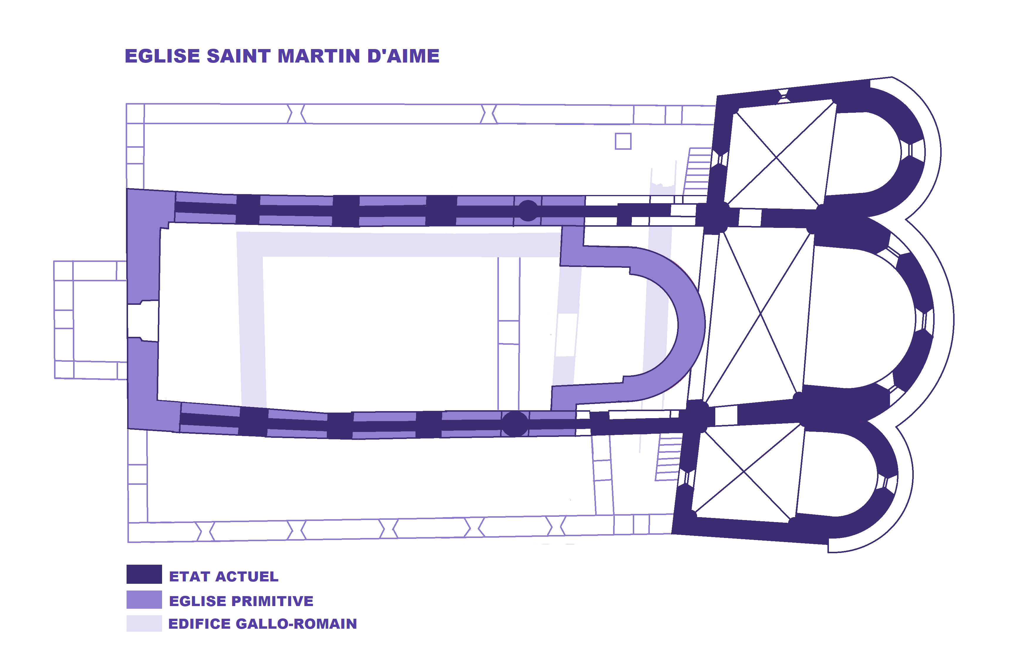 Eglise Saint Martin d'Aime, Savoie, Plan